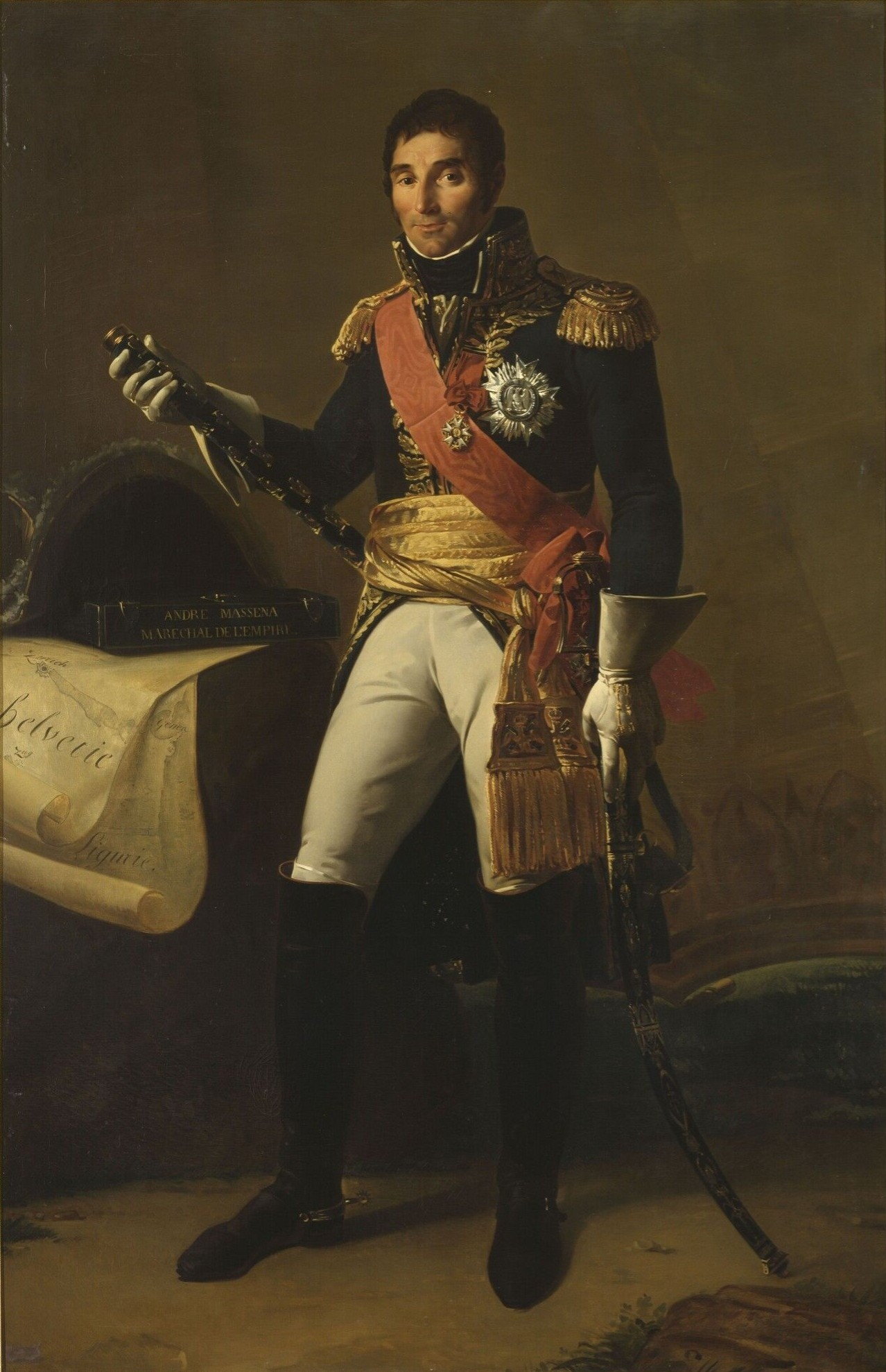 Le maréchal André Masséna (1758-1817), duc de Rivoli et prince d'Essling.